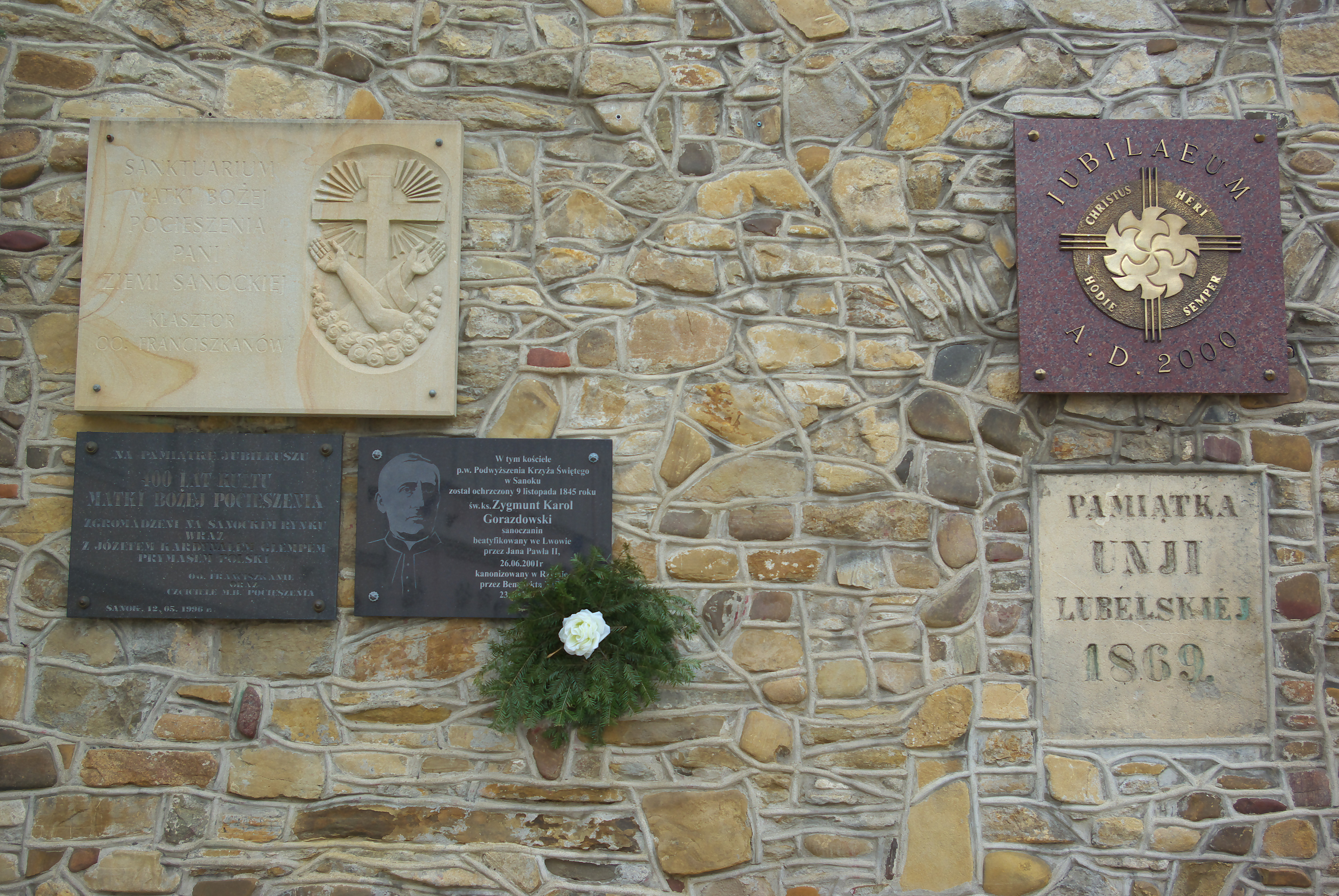 Tablice pamiątkowe w kościele Franciszkanów w Sanoku